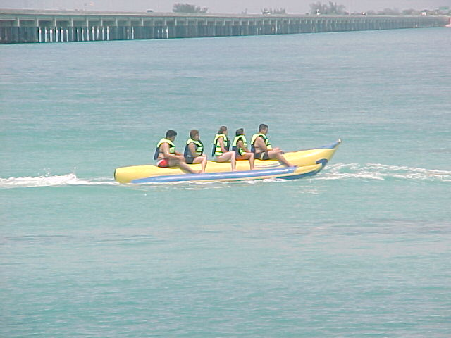 Deportes acuaticos en la Isla del Carmen, Puente de la Unidad